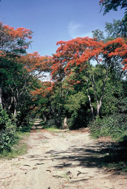 As acácias rubras no itinerário Balibó-Batugadé